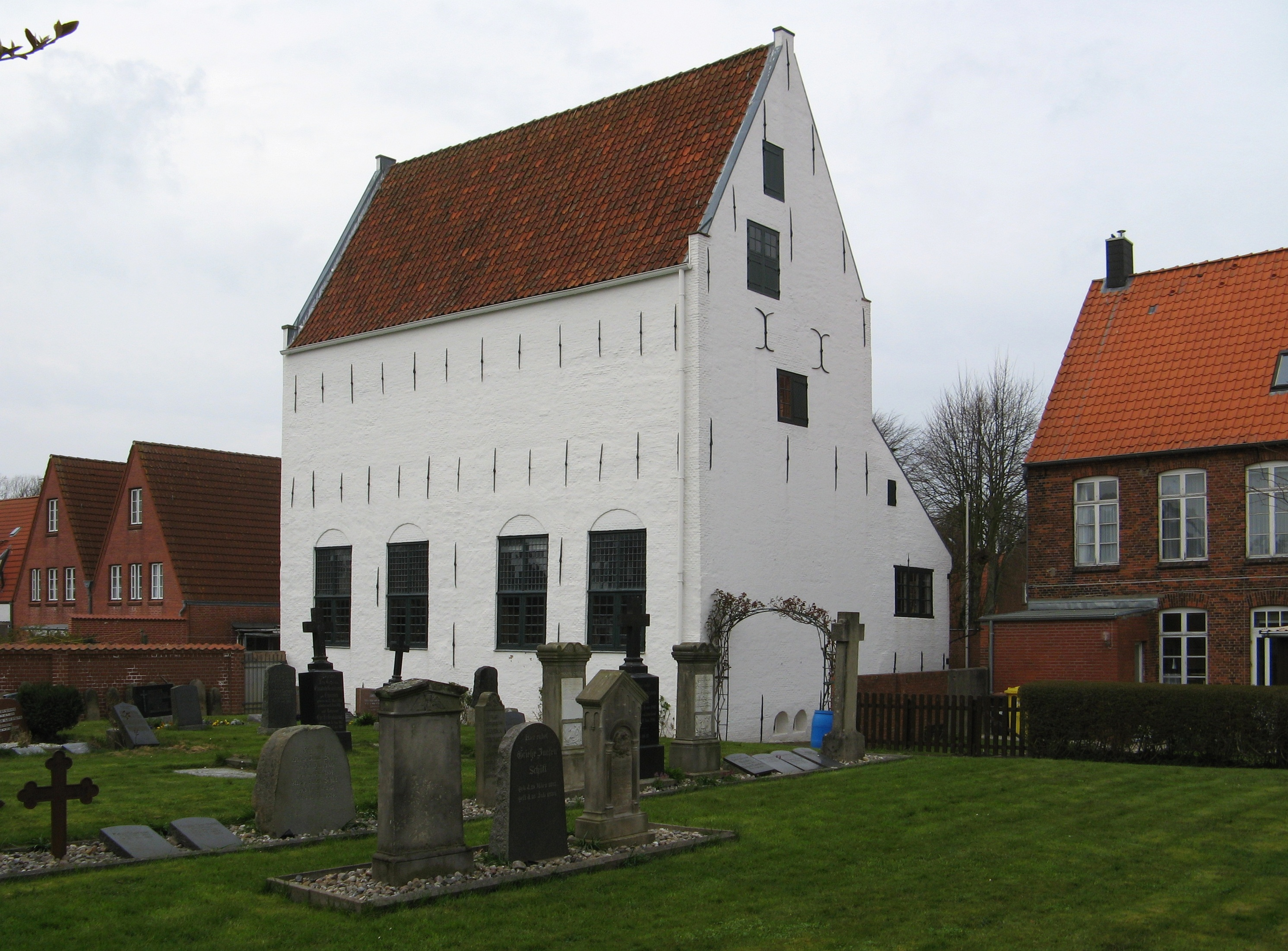 Mennonitenkirche Author: Dirk Ingo Franke